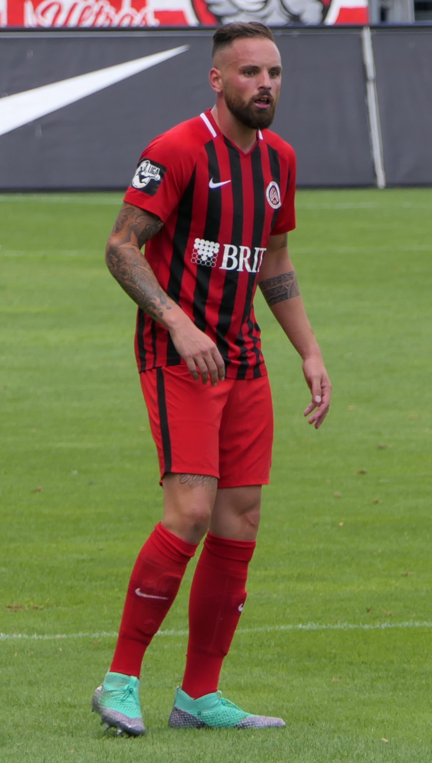 Der Fussballprofi Giuliano Modica im Trikot von Wehen Wiesbaden beim Heimspiel gegen Eintracht Braunschweig am 11.08.2018.